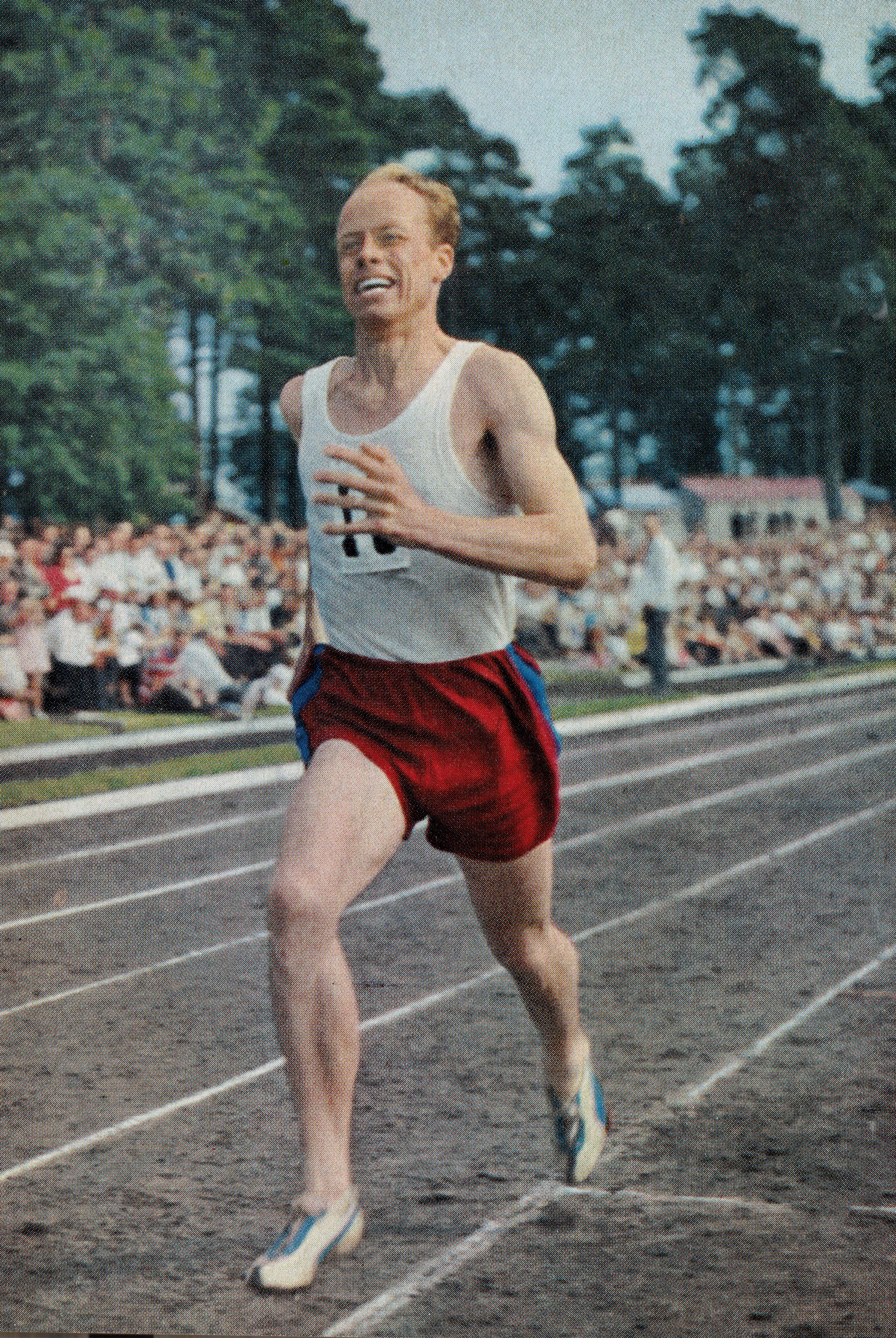 Dan Waern